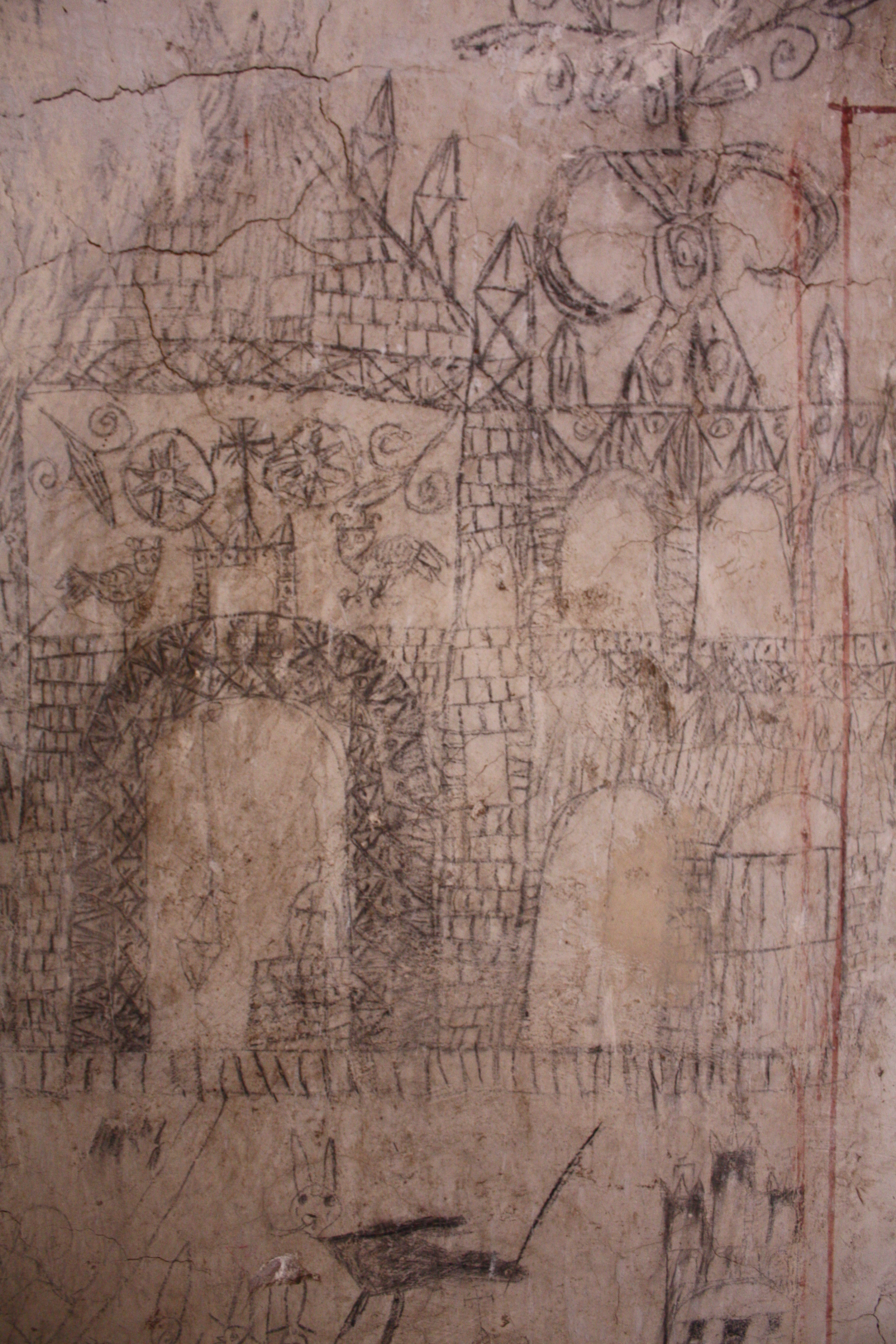 Convento de Actopan